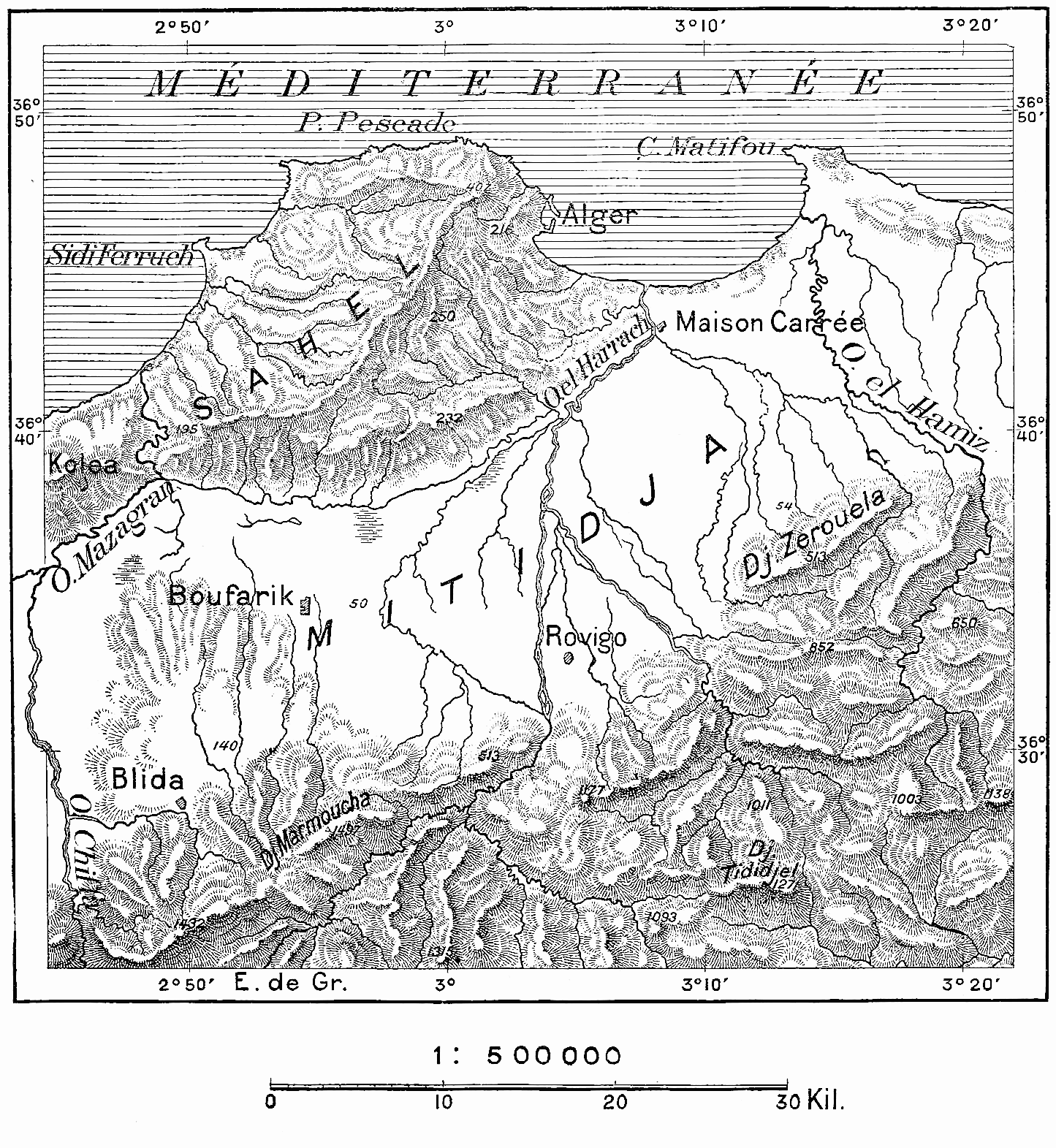 N° 444. Le Sahel d’Alger et la Mitidja